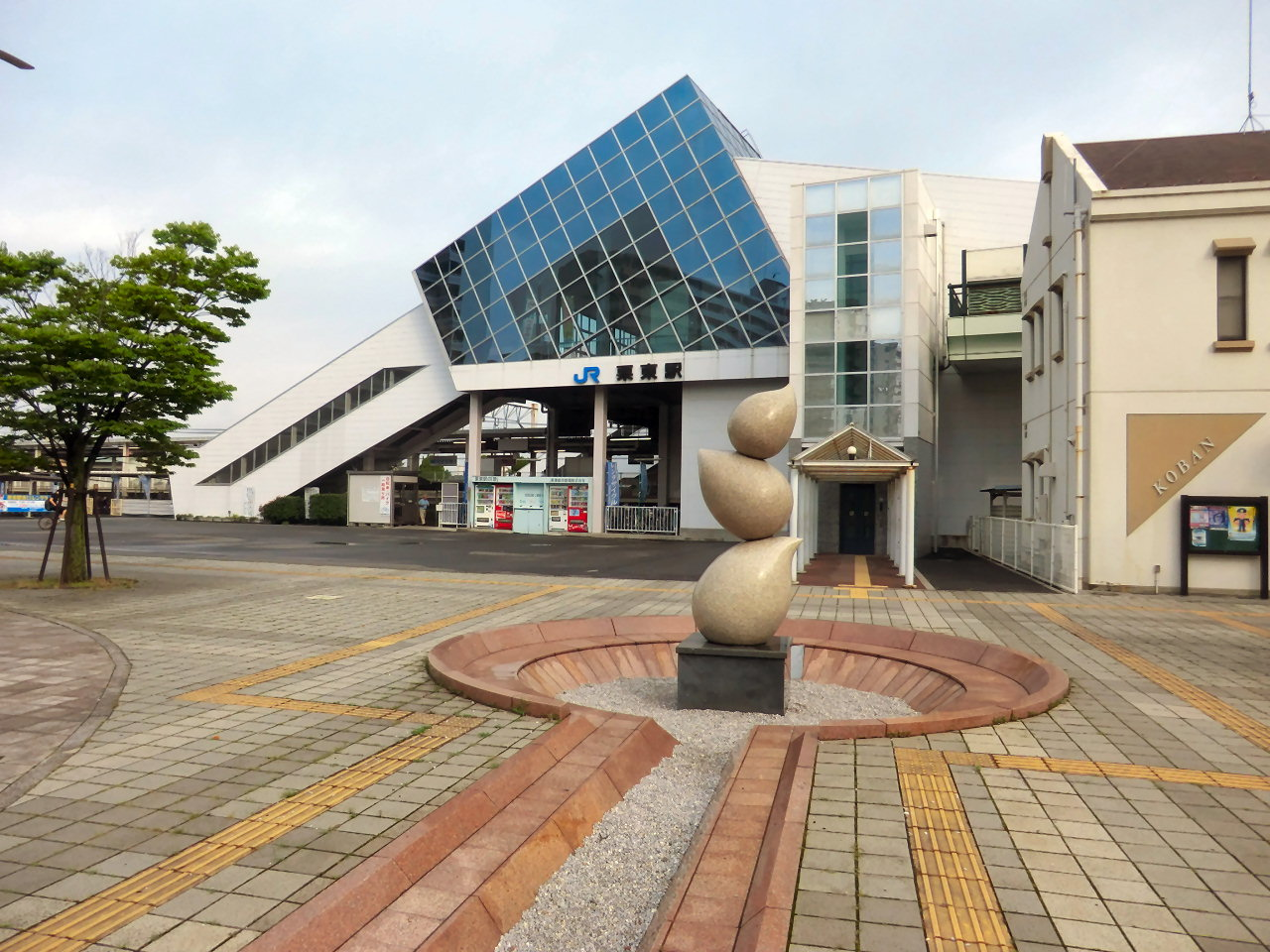 栗東駅東口 三段ウンコ